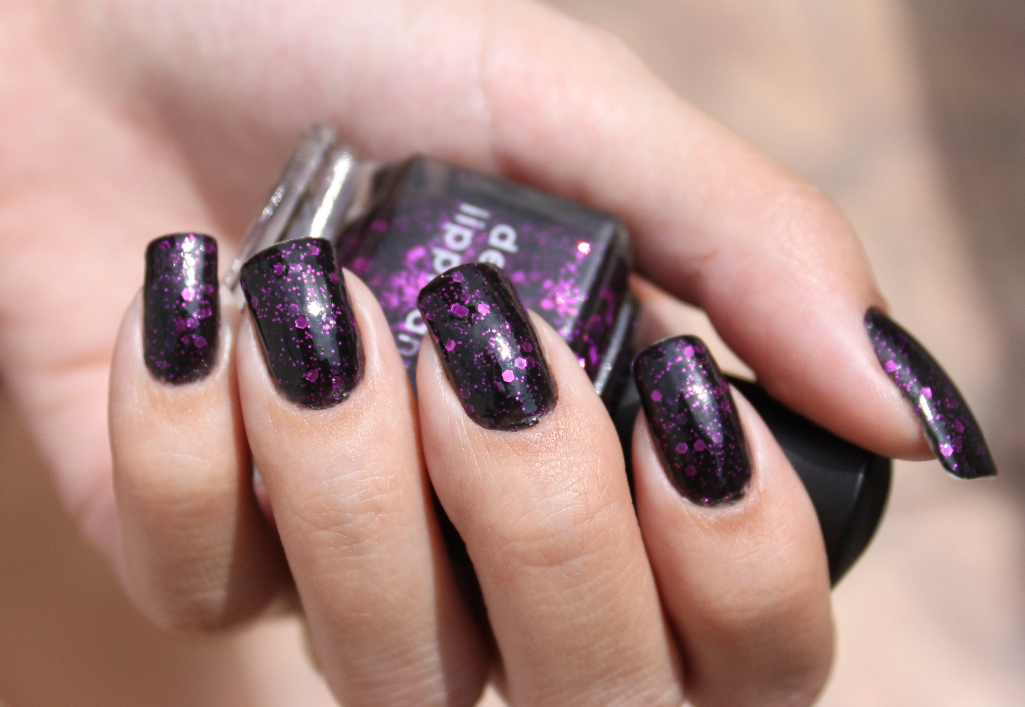 Oie meninas! Estava louca por um Deborah Lippmann há um tempão já, e assim que eu ganhei eu já queria usar um logo! Depois de muita indecisão entre esse ou o Across de universe eu pintei! Que esmalte perfeito é esse? Uns dos mais bonitos que já passaram por aqui. Ele tem uma base preta jelly com dois tipos de glitters magenta, que dá o charme. Sem nenhum truque para passar, o esmalte é uma delícia de usar e fica perfeito! Aqui o Pink Vigarista cedendo o seu lugar do meu TOP 15! Hehe